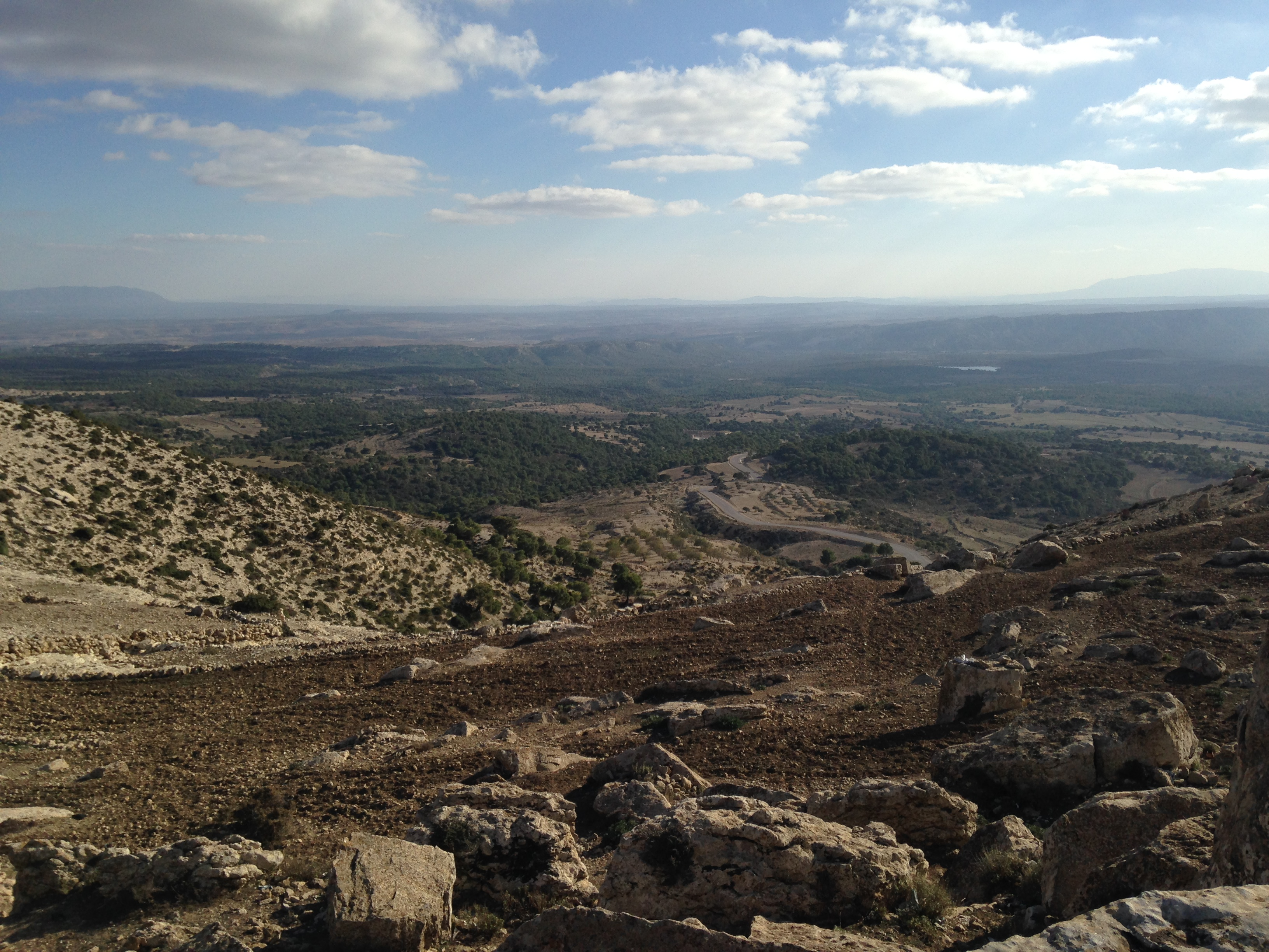 vue panoramique de Kasra Tunisie